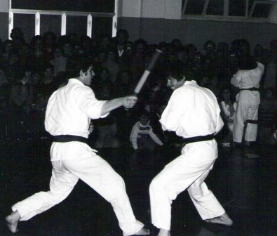 Giorgio Carcangiu e Giorgio Marras in azione. Dimostrazione su attacco di bastone, tenutasi nel paese natale di Giorgio Carcangiu il 26 marzo 1977.